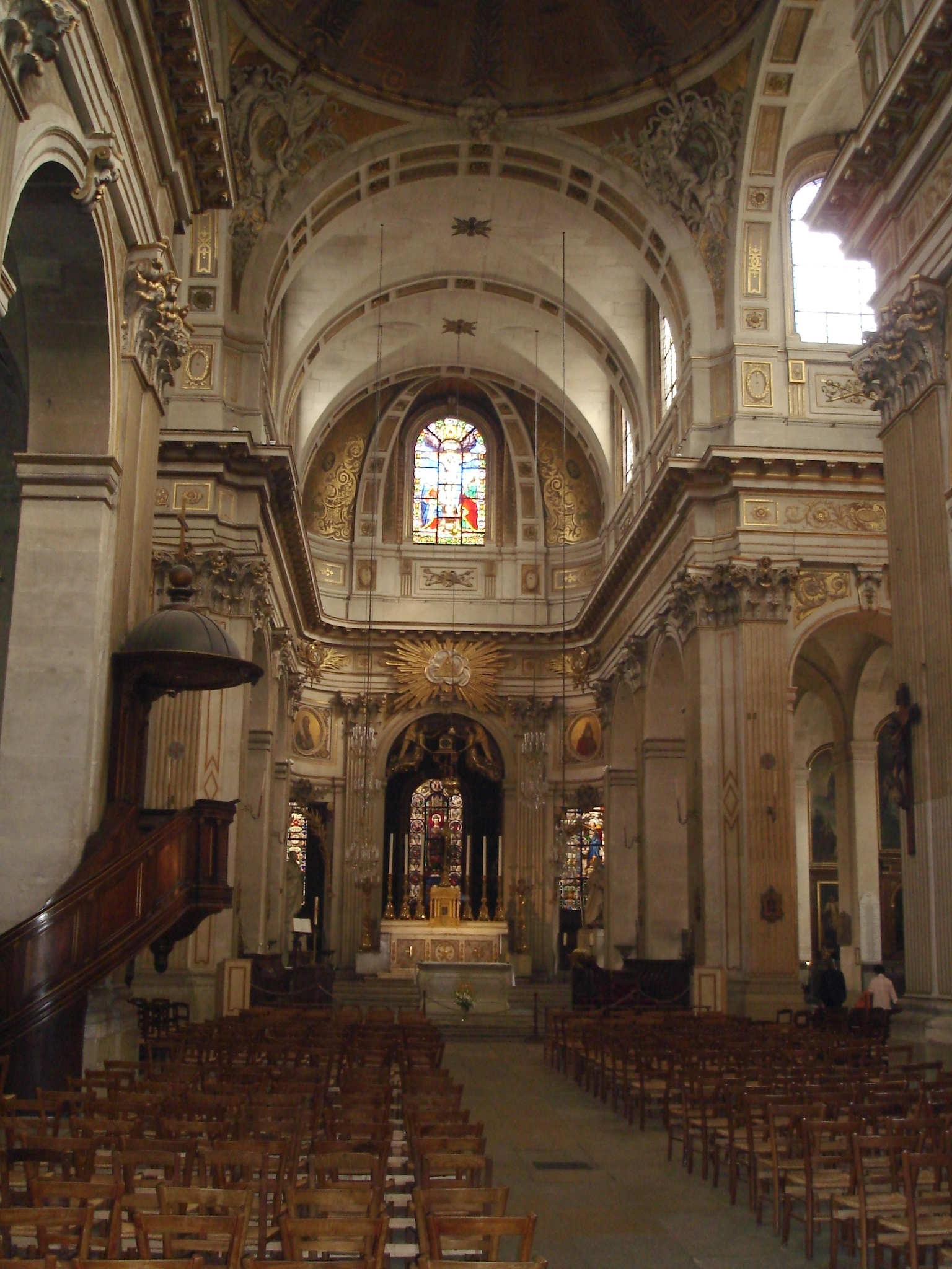 Église Saint-Louis-en-l'Île; inside of the church